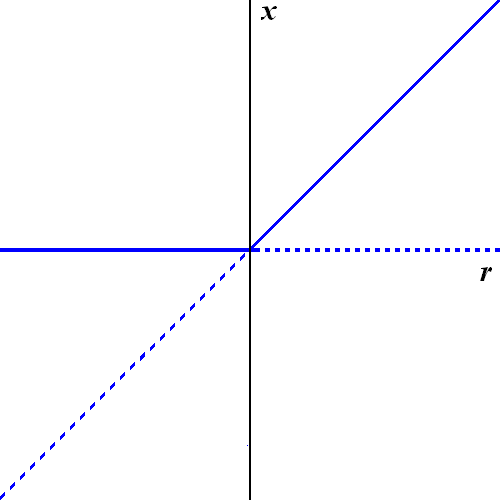 Transcritical bifurcation - Bifurcation diagram